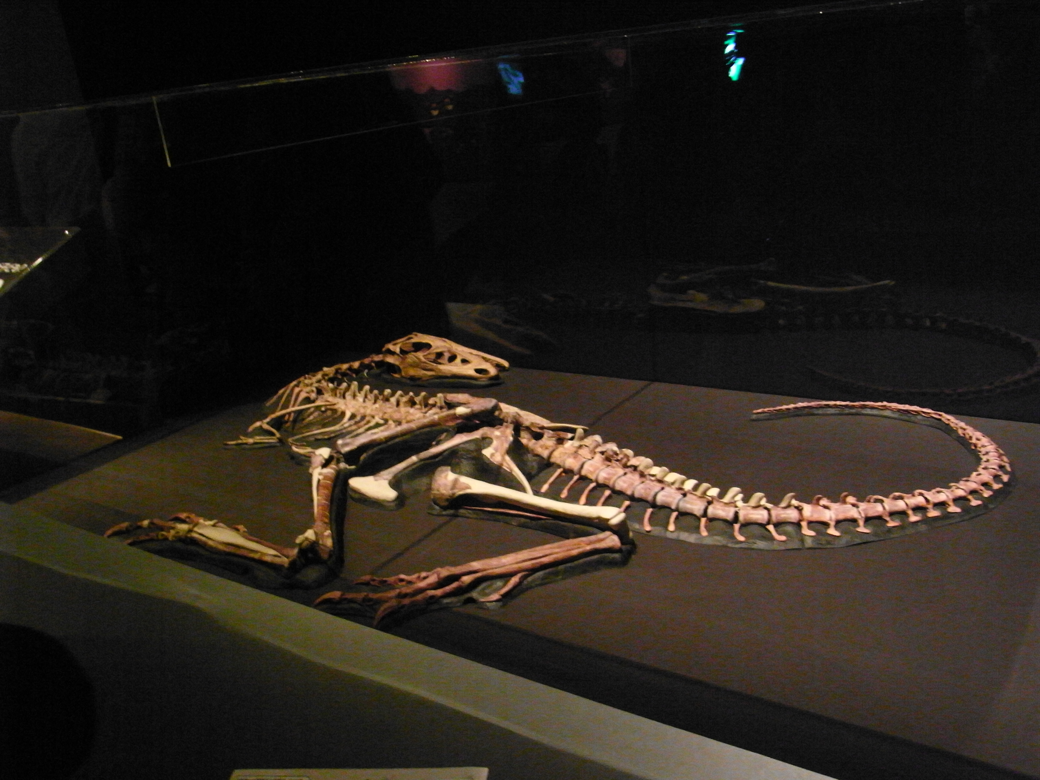 ティラノとそっくりな作りの骨。